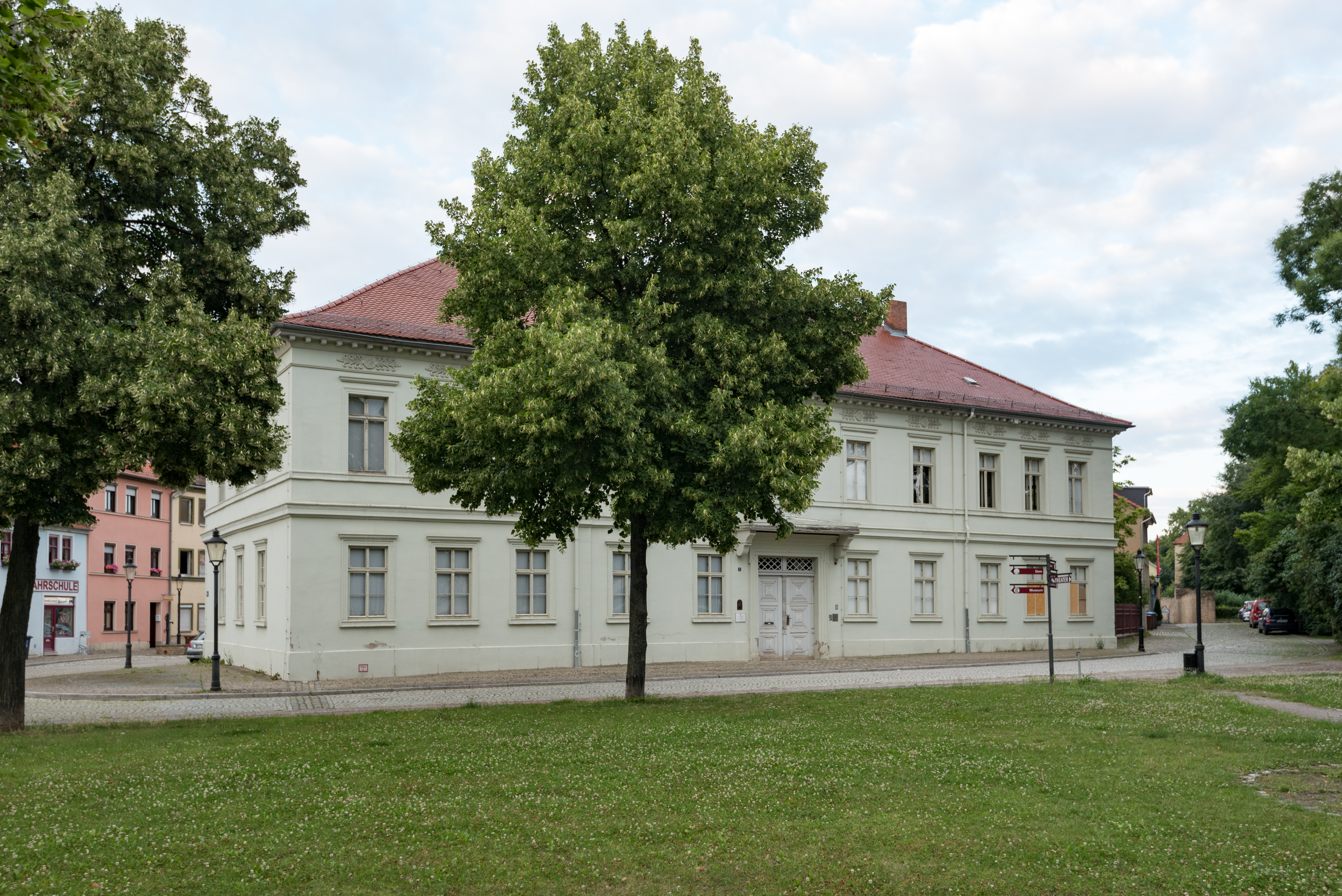 Naumburg (Saale), Kramerplatz 1